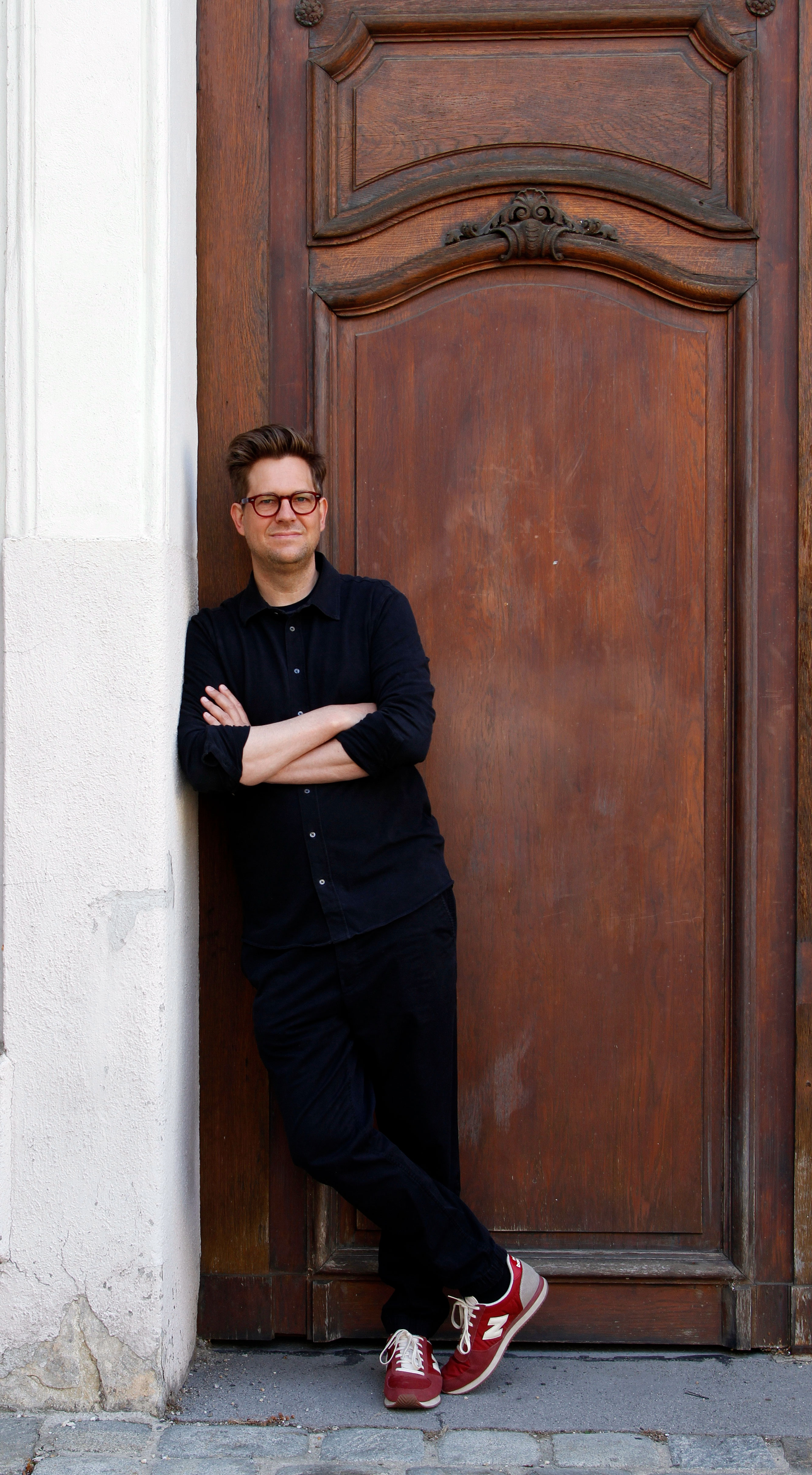 Sefan Wolner - Regisseur